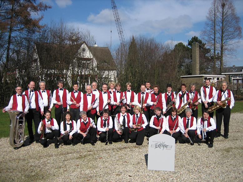 Groepsfoto Harmonie Excelsior Pijnacker